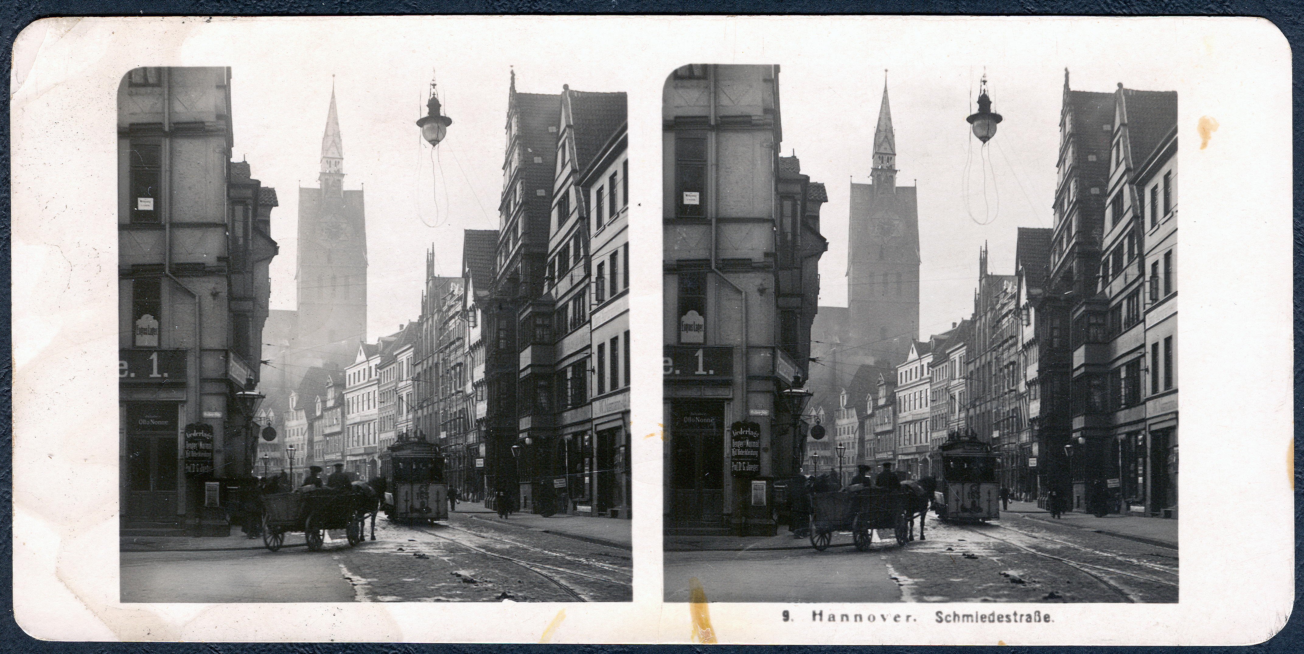 Bildseite mit der laufenden Nummer 9 aus der ab 1907 von der Neuen Photographischen Gesellschaft AG, Berlin-Steglitz vertriebenen Stereoskopie-Kartenserie Hannover. Der noch unidentifizierte Fotograf stand hier an der Ecke Osterstraße, wo Emil Nonne sein Bekleidungs-Geschäft betrieb mit seiner "Niederlage von Benger's Normal Woll-Unterkleidung ... Prof. Dr. G. Jaeger". Der Blick geht durch die Schmiedestraße vorbei am ehemaligen Leibnizhaus in Richtung der Marktkirche. Während die Straßenlaternen an den Fußgängerwegen wohl noch mit Gas der Imperial_Continental_Gas_Association betrieben wurden, deutet die Lampe in der oberen Bildmitte über der Straße auf den Beginn der elektrischen Straßenbeleuchtung. Neben der Pferdekutsche fährt bereits eine elektrische Straßenbahn mit der Wagen-Nummer 163 (165?), rechts daneben ist ein Gebäude mit Holzlatten eingerüstet ... Diese Karte wurde freundlicherweise von Ilse Paul zur Verfügung gestellt, um sie als Digitalisat über Wikimedia Commons nachhaltig allen Menschen zur Verfügung zu stellen ...